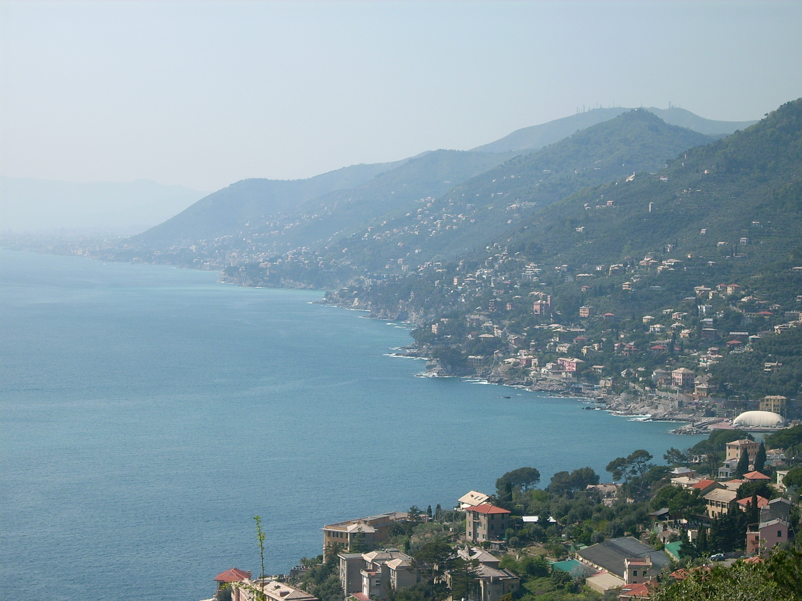 Panorama dei comuni che costituiscono il Golfo Paradiso